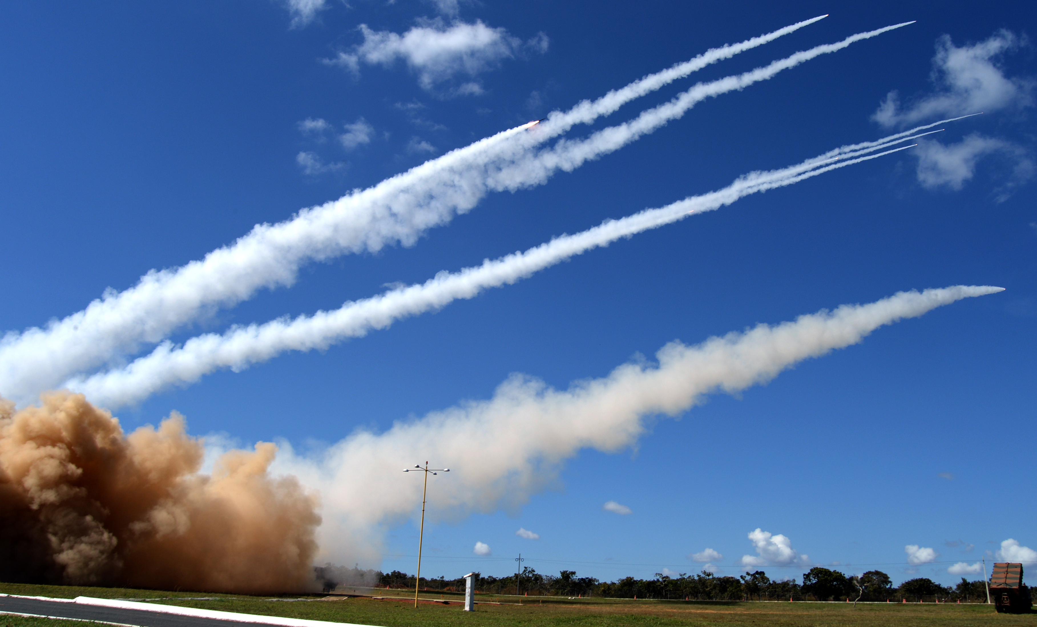 06/06/2014, Formosa - GO Fotos: Jorge Cardoso